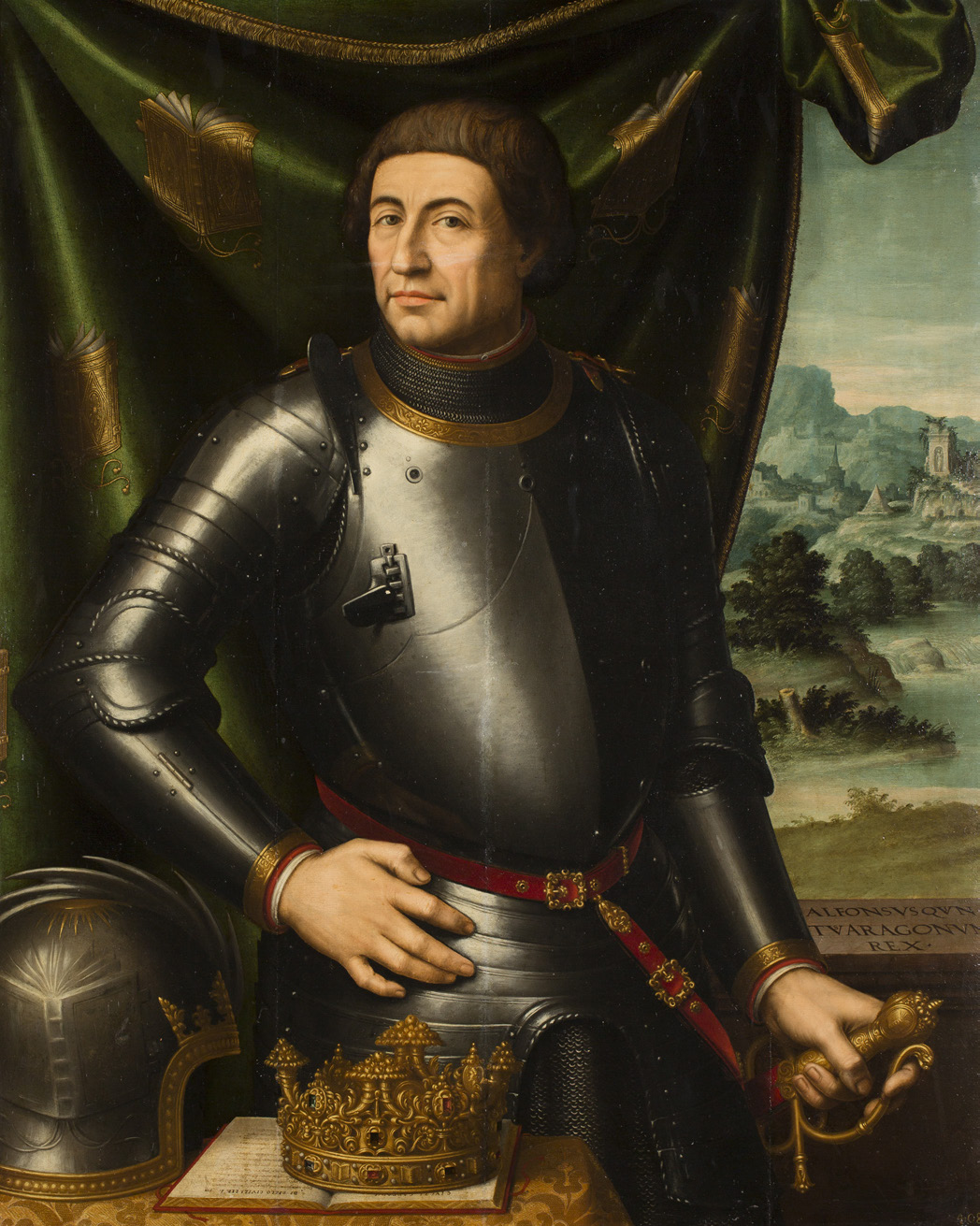 La obra representa al rey aragonés, Alfonso V de Aragón (1416-1458), vestido con armadura de época de Carlos I de Aragón. En primer término, encima de la mesa, se presentan objetos significativos: corona (rey), yelmo (conquistador) y libro abierto (cultura). A través del ventanal se observa un paisaje con ruinas romanas, y se ha postulado que aparece el Castel Nuovo de Nápoles, residencia del rey de Aragón tras su conquista de Nápoles.